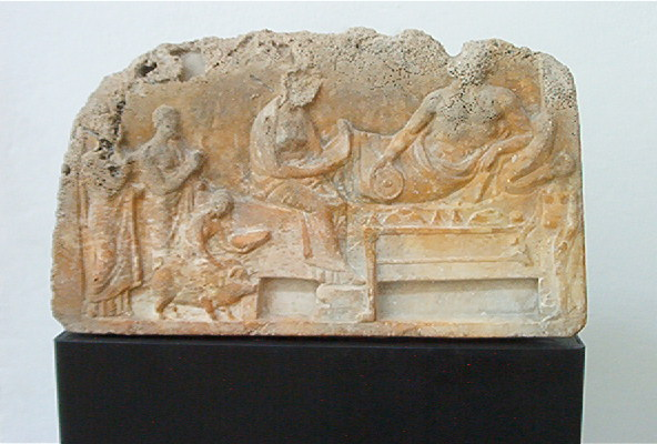 Ex-voto en relief grec, des fouilles de Mahdia au musée du Bardo: Asclépios et Hygieia recevant des offrandes.